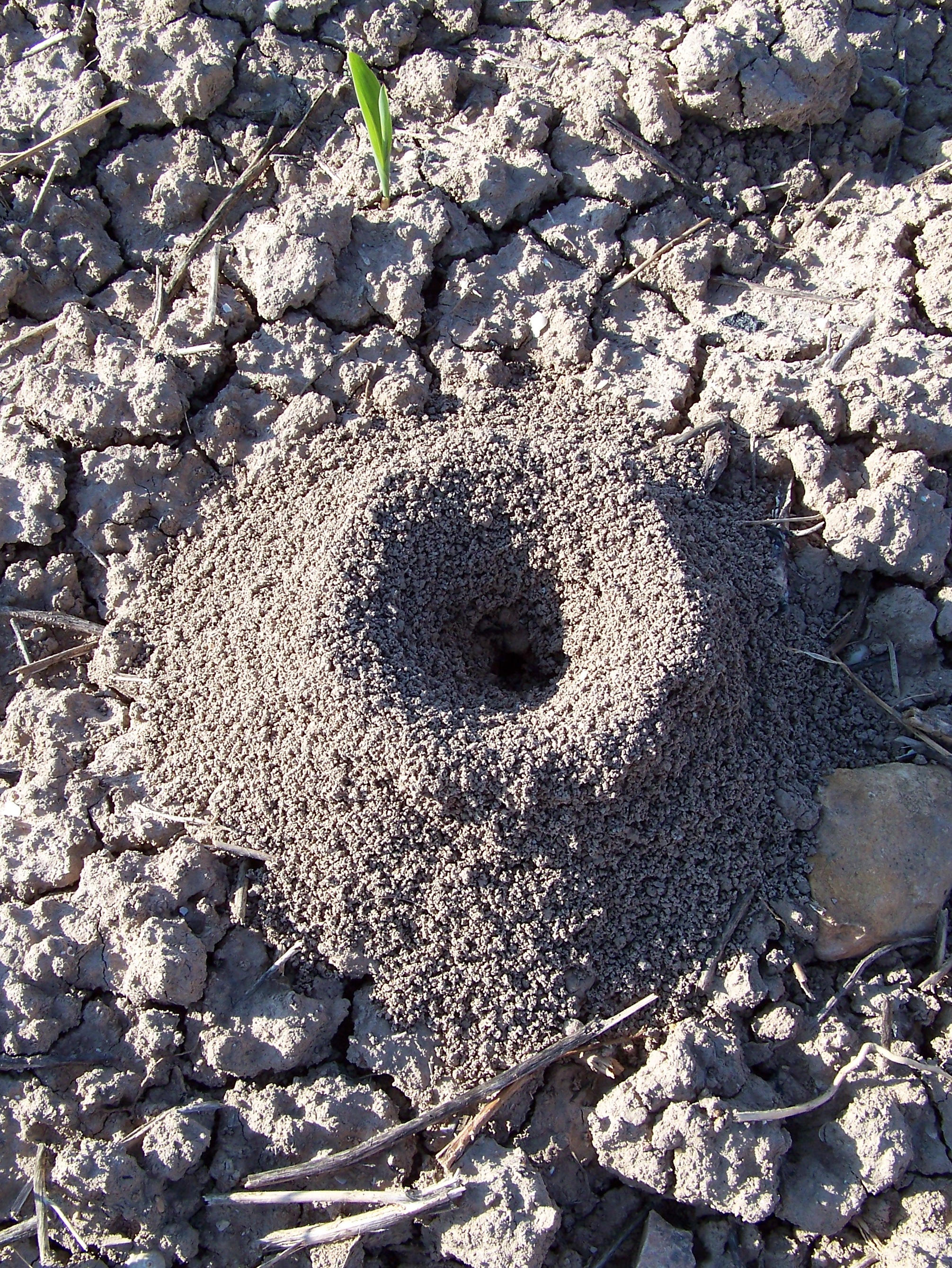 Messor barbarus : cono exterior del nido - Los Ojales, Albatera (Alicante, España).